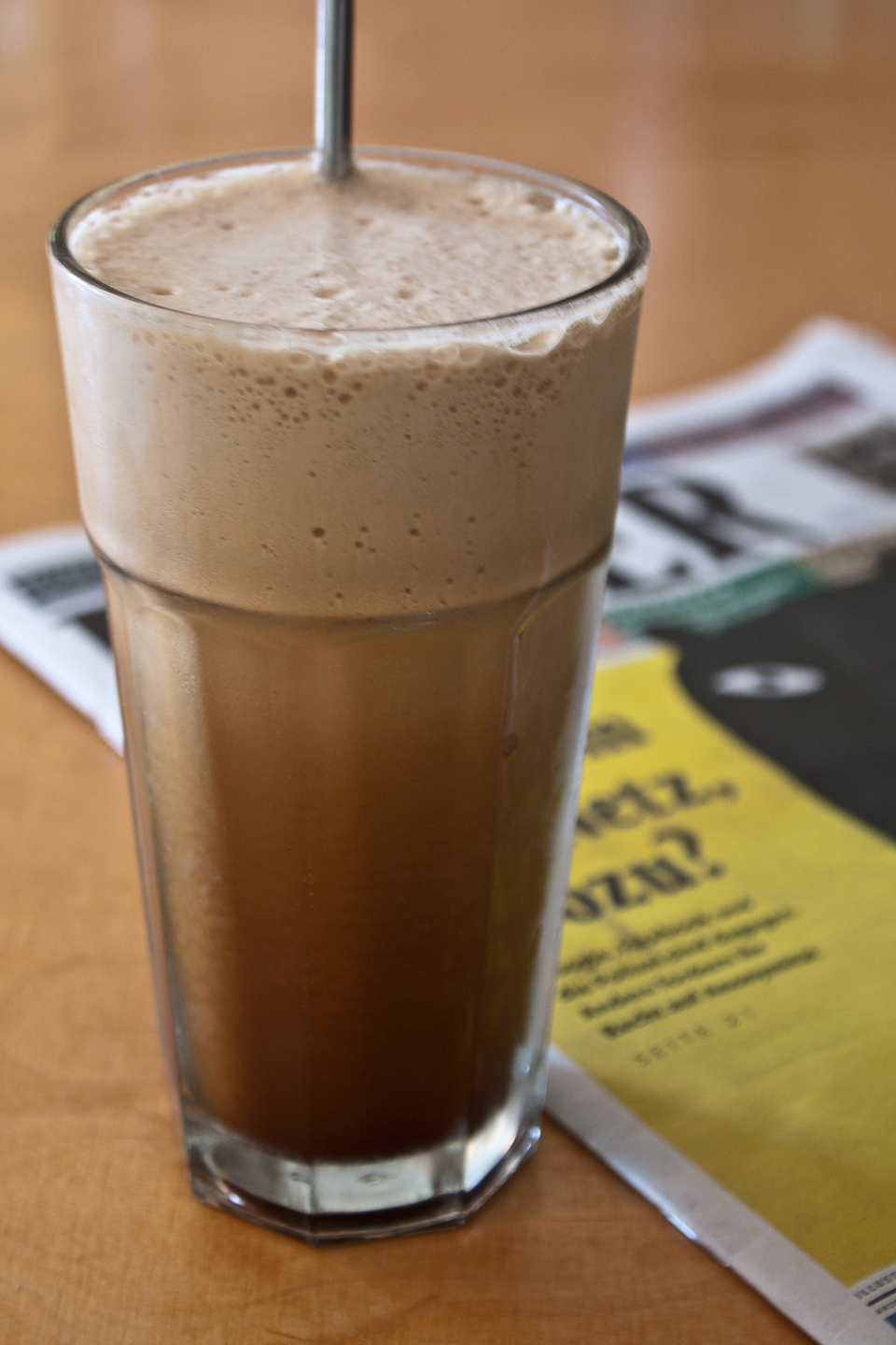 Ein selbstgemachter Café frappé in einem Glas.